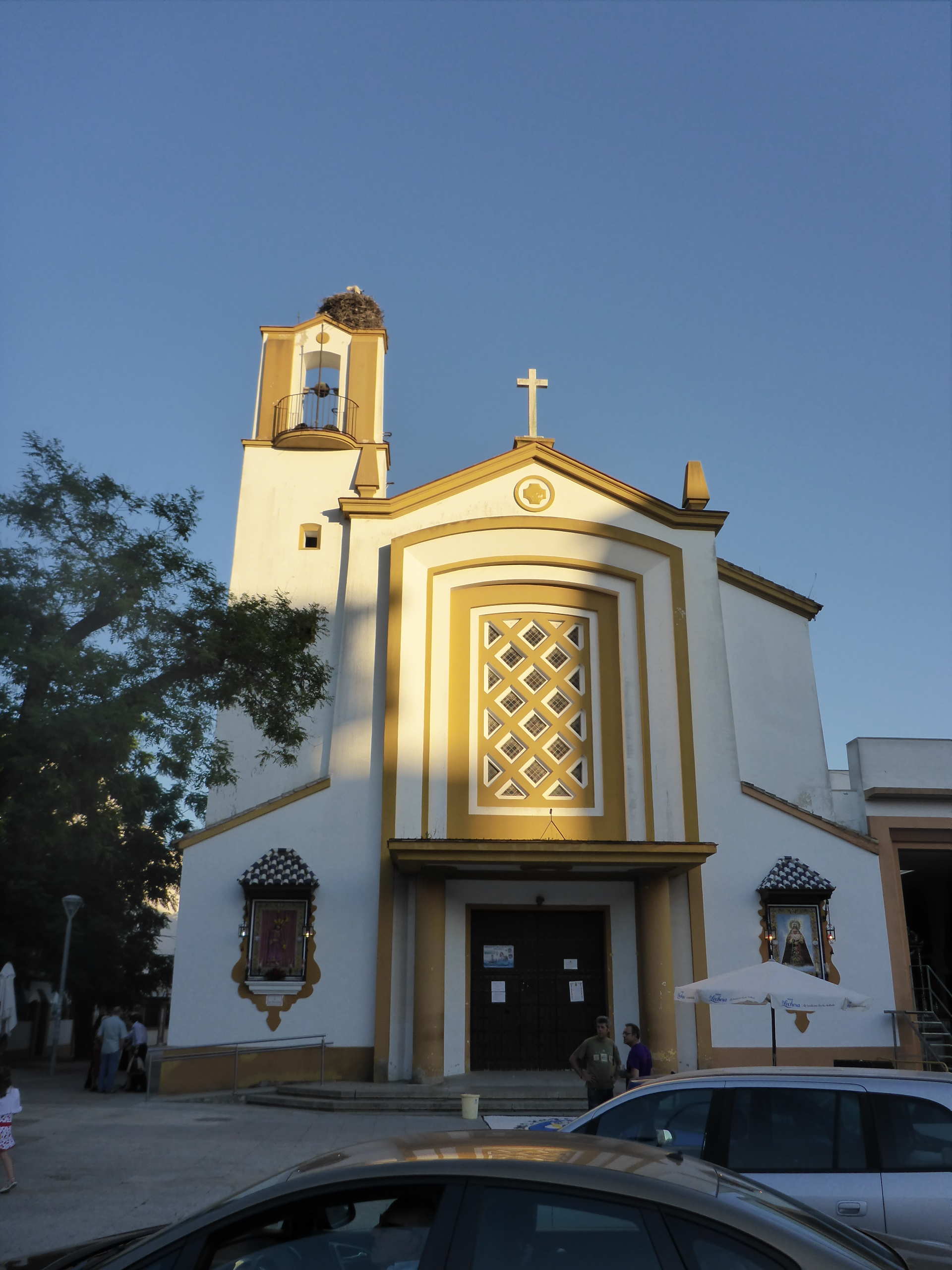 Víspera del Corpus de la Hermandad de La Candelaria en Jerez de la Frontera (Andalucía, España).